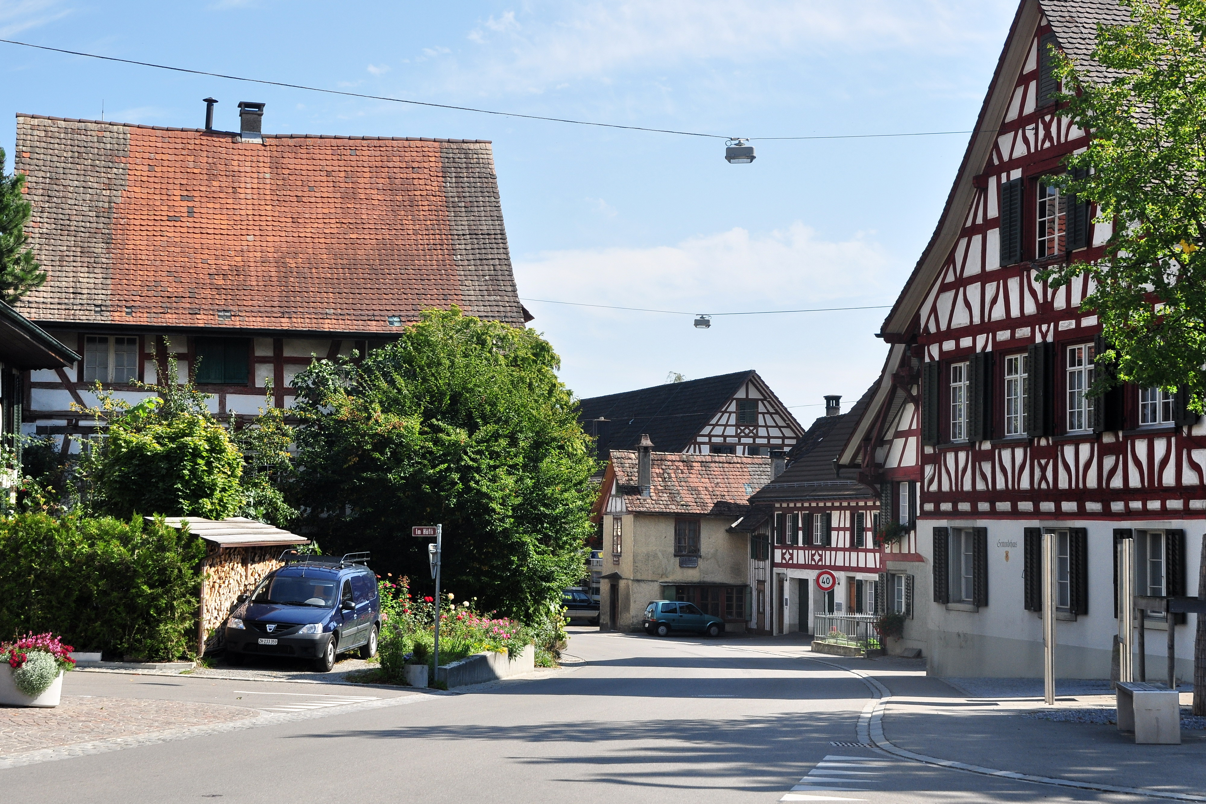 Hauptstrasse in Oberstammheim (Switzerland)